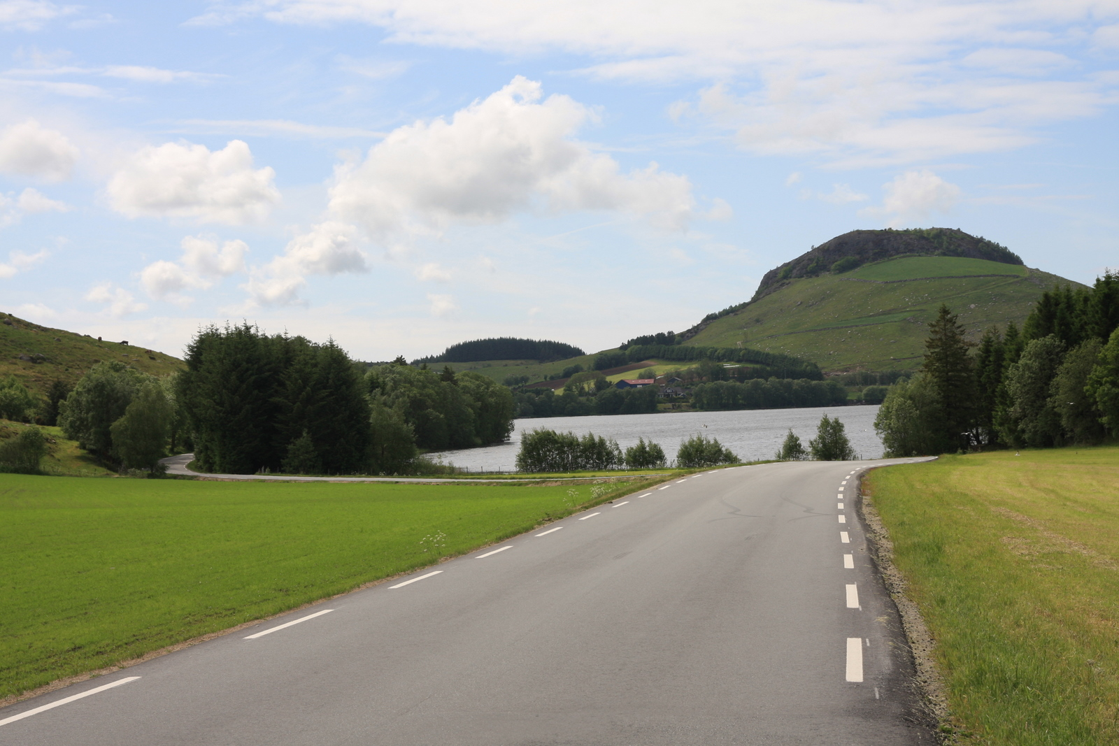 Fylkesvei 333 (Espelandveien)